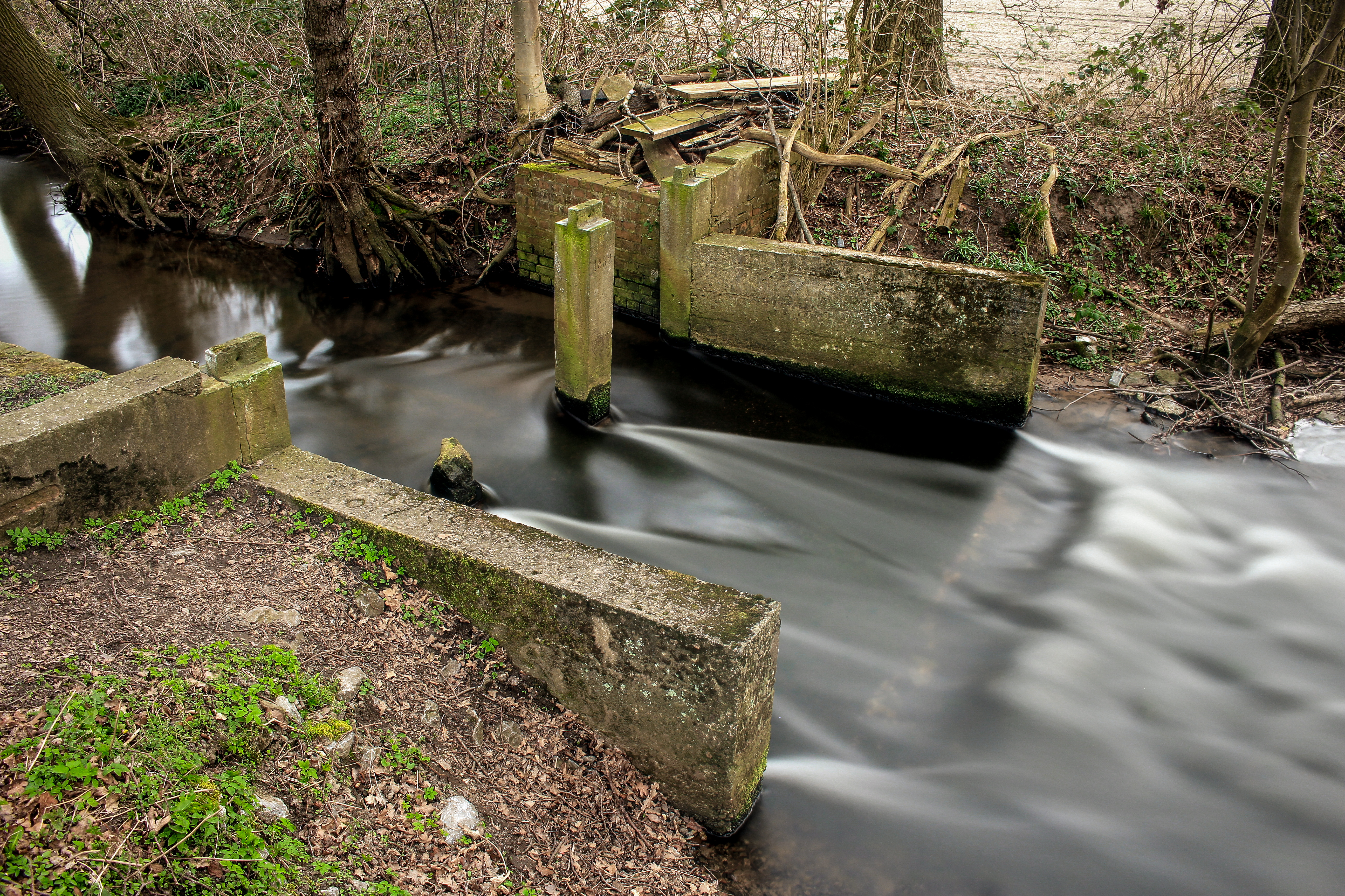 Langzeitbelichtung von einem alten Stauwehr am Ölbach in Verl